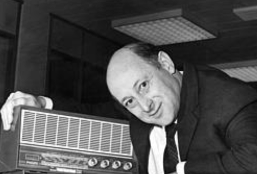 Manne Grünberger, svensk skådespelare, 1964.